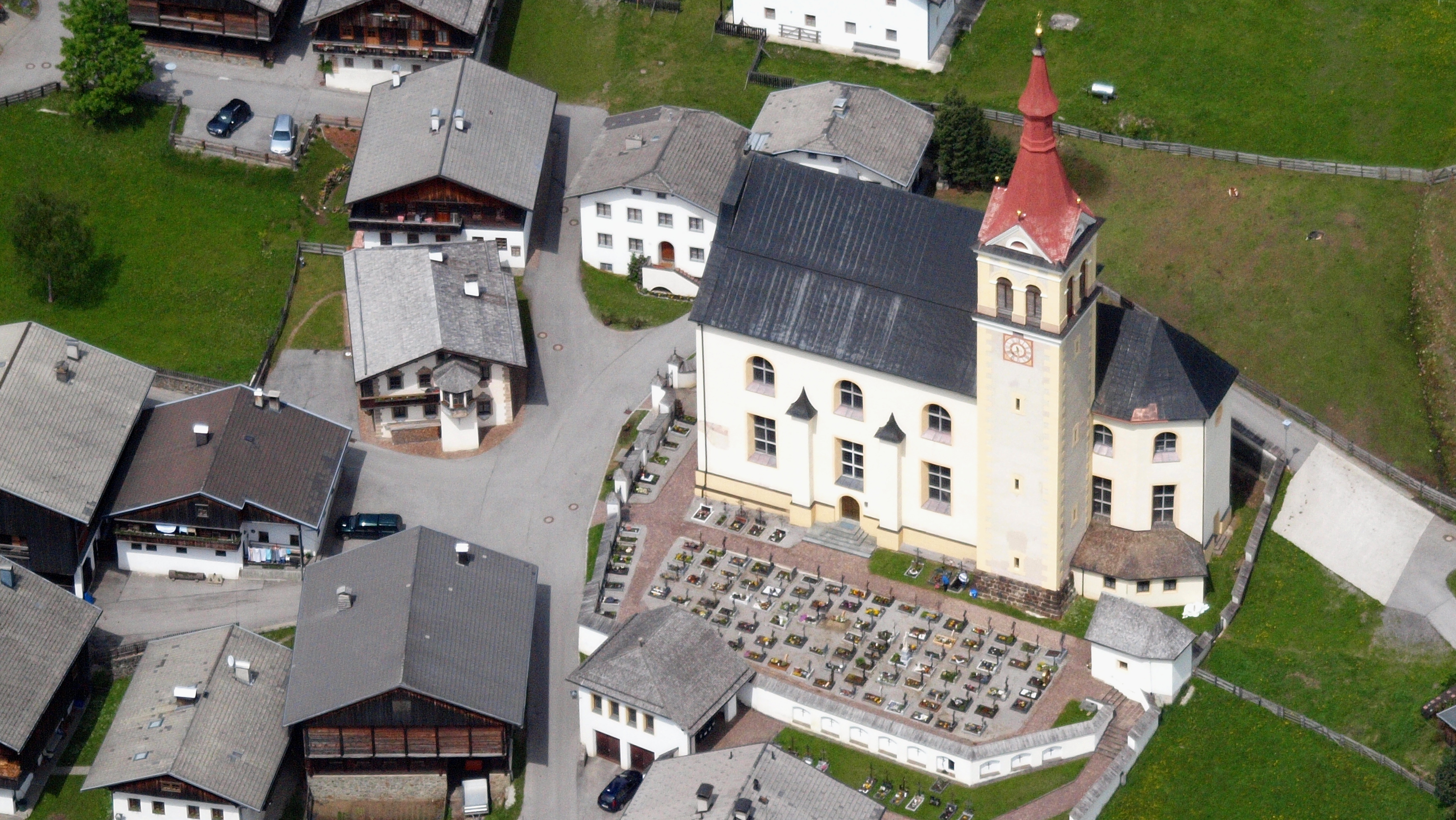 Obertilliach, kath Pfarrkirche Hl Ulrich